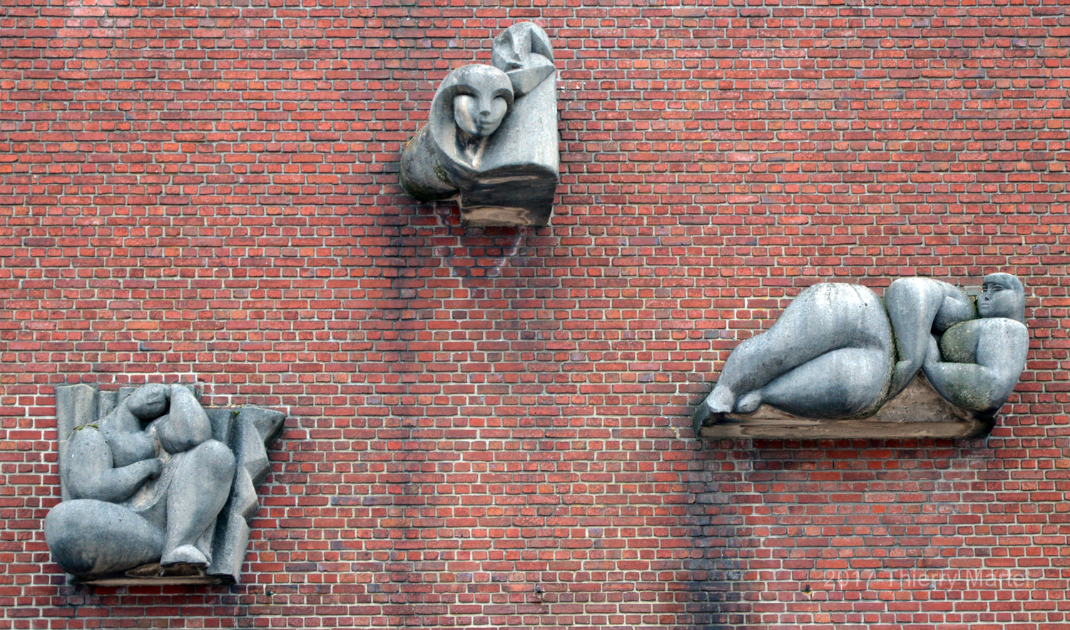 Trois œuvres (pas plus d'infos) du sculpteur André Augustin Sallé sur la façade de la Salle de la Renaissance à Longueau. (bâtiment qui a été détruit en janvier 2018)